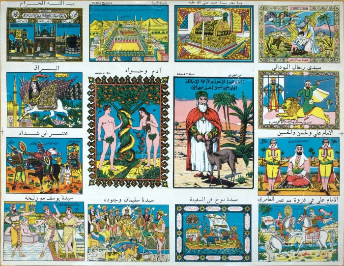 Prent met kleine afbeeldingen van veertien veelvoorkomende prenten. Een aantal van deze afbeeldingen verbeeldt verhalen uit de Koran die ook in de Bijbel voorkomen. De twee afbeeldingen in het midden stellen Adam en Hawa, de bijbelse Adam en Eva, (links) en Ahmed al-Tidjani (rechts) voor. Ahmed al-Tidjani (Marokko, 1737-1815) is een bekende soefi-meester en oprichter van de Tidjani soefi-orde. De overige 12 afbeeldingen stellen voor, vanaf rechtsboven tegen de klok in: 1. Het offer van de profeet Ibrahim van zijn zoon Ismaïl 2. Het graf van de profeet Mohammed in Medina 3. De moskee in Medina 4. De drie meest heilige plaatsen van de islam: de Ka'aba in Mekka, de moskee in Medina en de al-Aqsa moskee in Jerusalem 5. Buraq, het gevleugelde paard waarop de profeet Mohammed een hemelreis maakte. 6. Antar, hoofdpersoon uit de Arabische volkslegende 'Antar en Abla'. 7. De verleiding van Yusuf (Josef) door de vrouw van Qitfir (Potifar), aan het hof van de farao te Egypte. 8. Sulayman (Salomo) met zijn soldaten. Sulayman is de koning van de djinn, hij wordt omringd door djinn met duivelshoorns en door dieren. Sulayman heeft magische krachten en kan met de dieren communiceren. 9. De ark van Nuh (Noach) 10. Imam Ali (d. 661), de stichter van de sjiietische stroming binnen de islam, in gevecht met 'Umar al-'Umari. 11. Imam Ali (d. 661) met zijn twee zonen Hassan en Hussein 12. Rahal al-Budali, een Marokkaanse soefi-sheikh, in de gevangenis met een leeuw. De voorstellingen op de prent komen overeen met die op prenten die in de 19e eeuw en eerste helft 20e eeuw veelvuldig in Syrië en Egypte gedrukt werden. Ook in Marokko, met name in Casablanca, werden deze prenten gedrukt. Gezien een aantal typisch Marokkaanse voorstellingen op de prent (Ahmed al-Tidjani en Rahal al-Budali) lijkt deze prent in Marokko te zijn vervaardigd. De prent wordt als decoratie in winkels en huizen opgehangen.